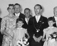 Bruinisse. Installatie van (voormalig gemeentesecretaris) C.H. van de Linde als burgemeester van Bruinisse; mevr. Van de Linde, hun dochter, raadslid Stoffel A. Jumelet, raadslid Willem van Gilst, burgemeester C.H. van de Linde, hun 2e dochter